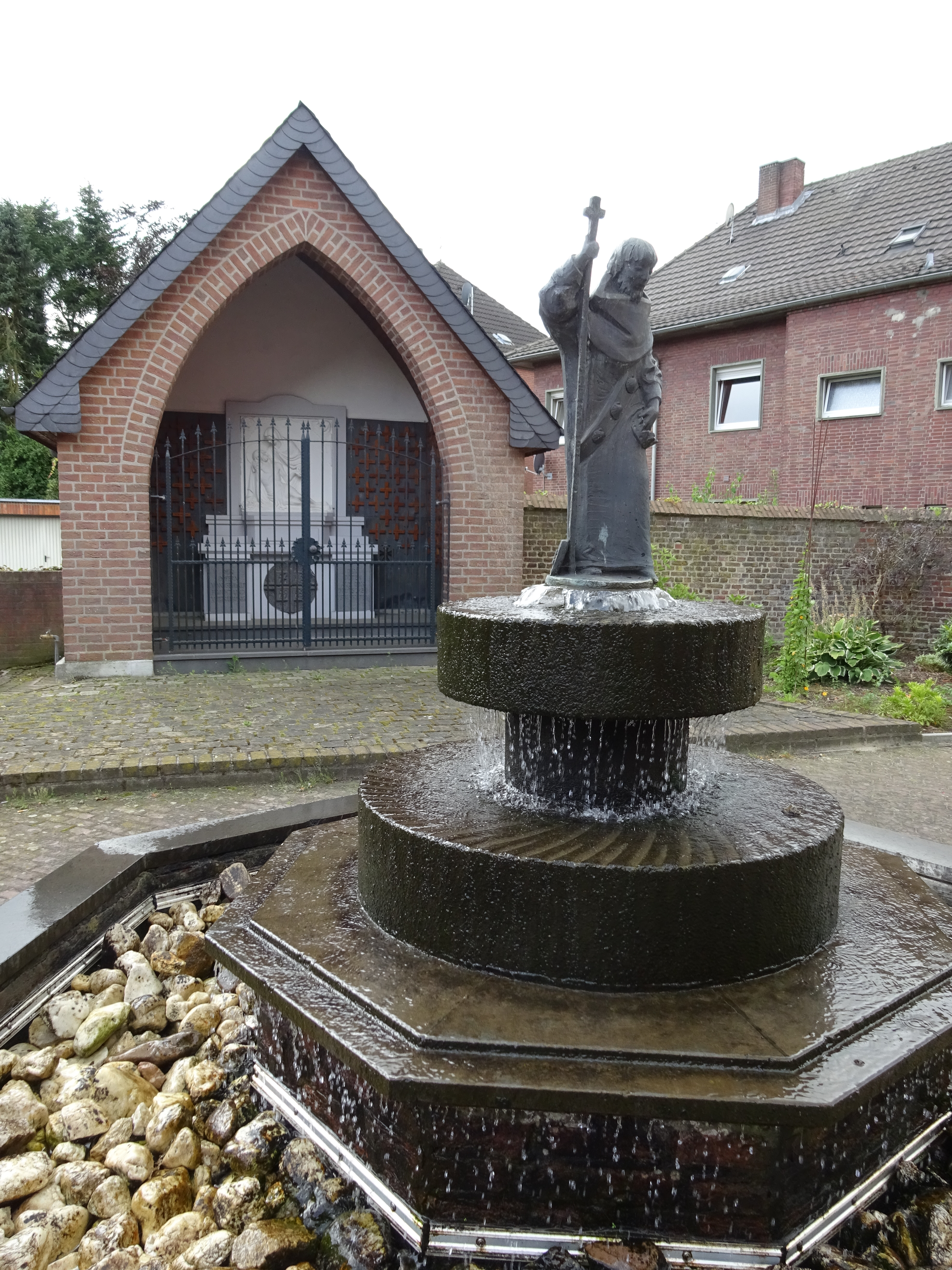 Statue des Heiligen Jodokus auf dem Brunnen auf dem Kirchplatz in Uedem-Keppeln, geschaffen vom Bildhauer Dieter von Levetzow in 1985